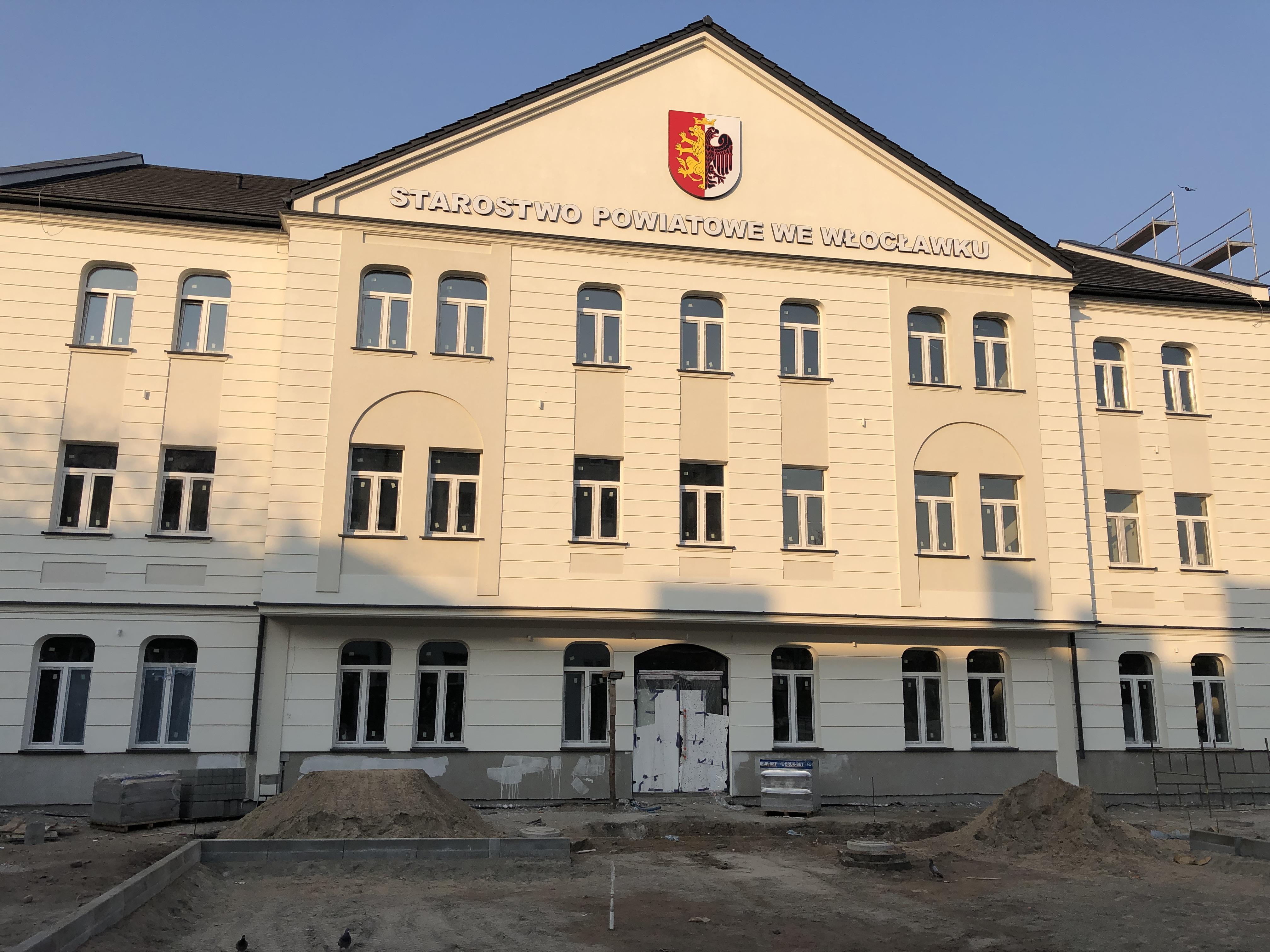 Nowy budynek Starostwa Powiatowego (2020 r.).